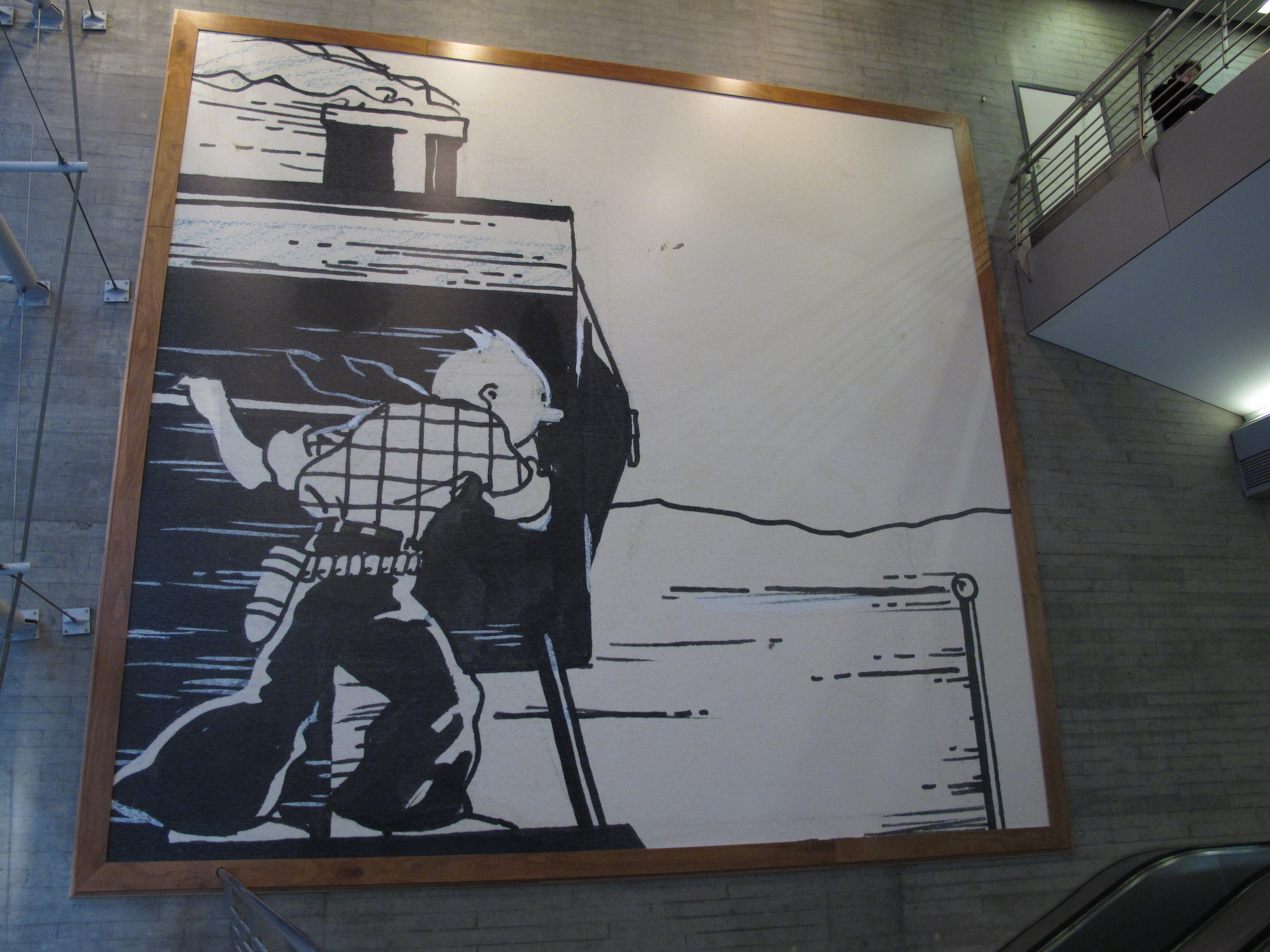 Stripmuur Kuifje in het westen in het station Brussel-Zuid